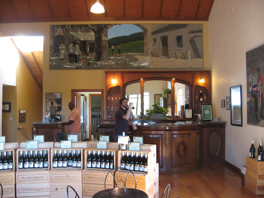 Oregon winery